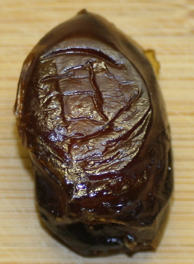 A Khadrawi date.